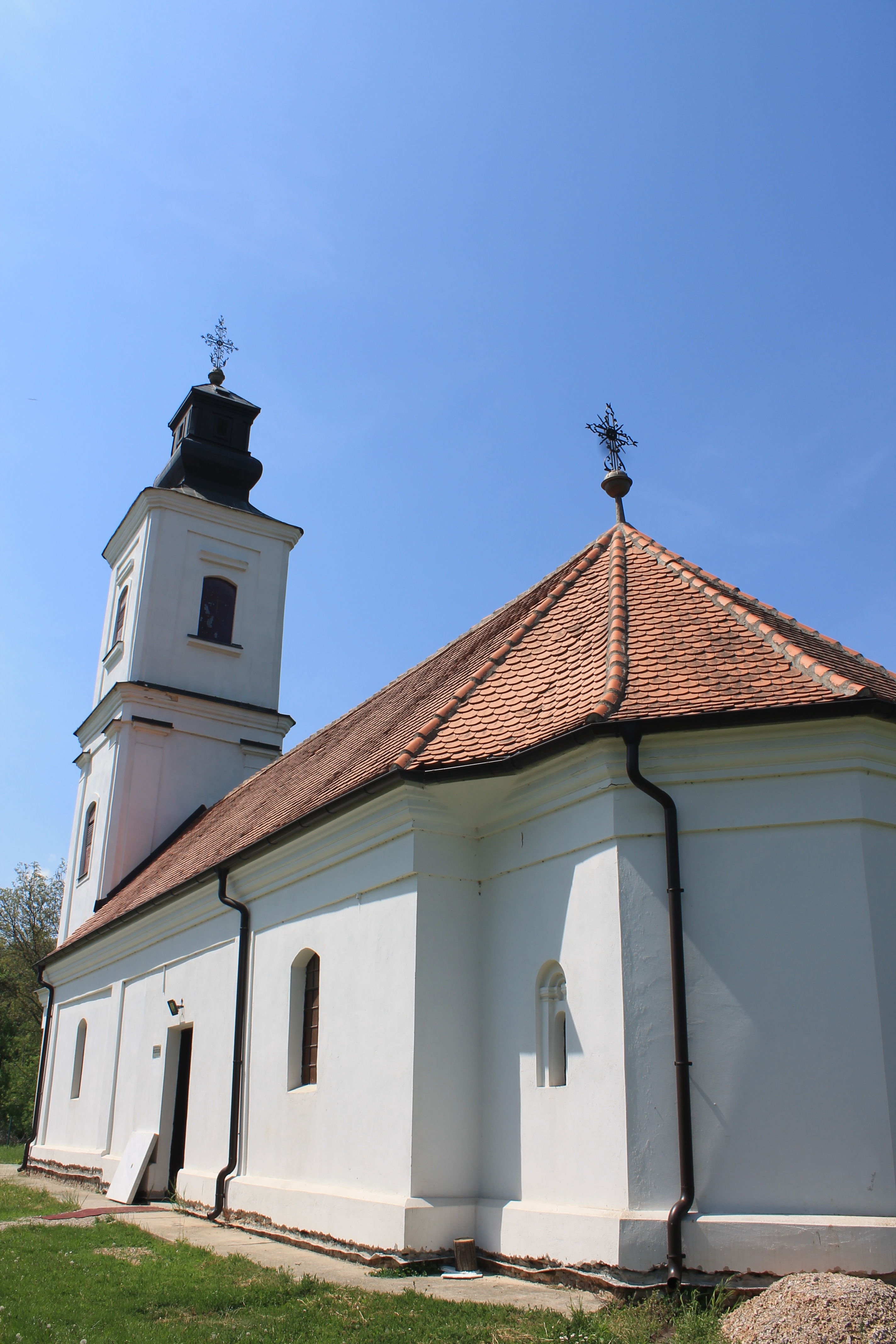 Crkva Sretenja Gospodnjeg